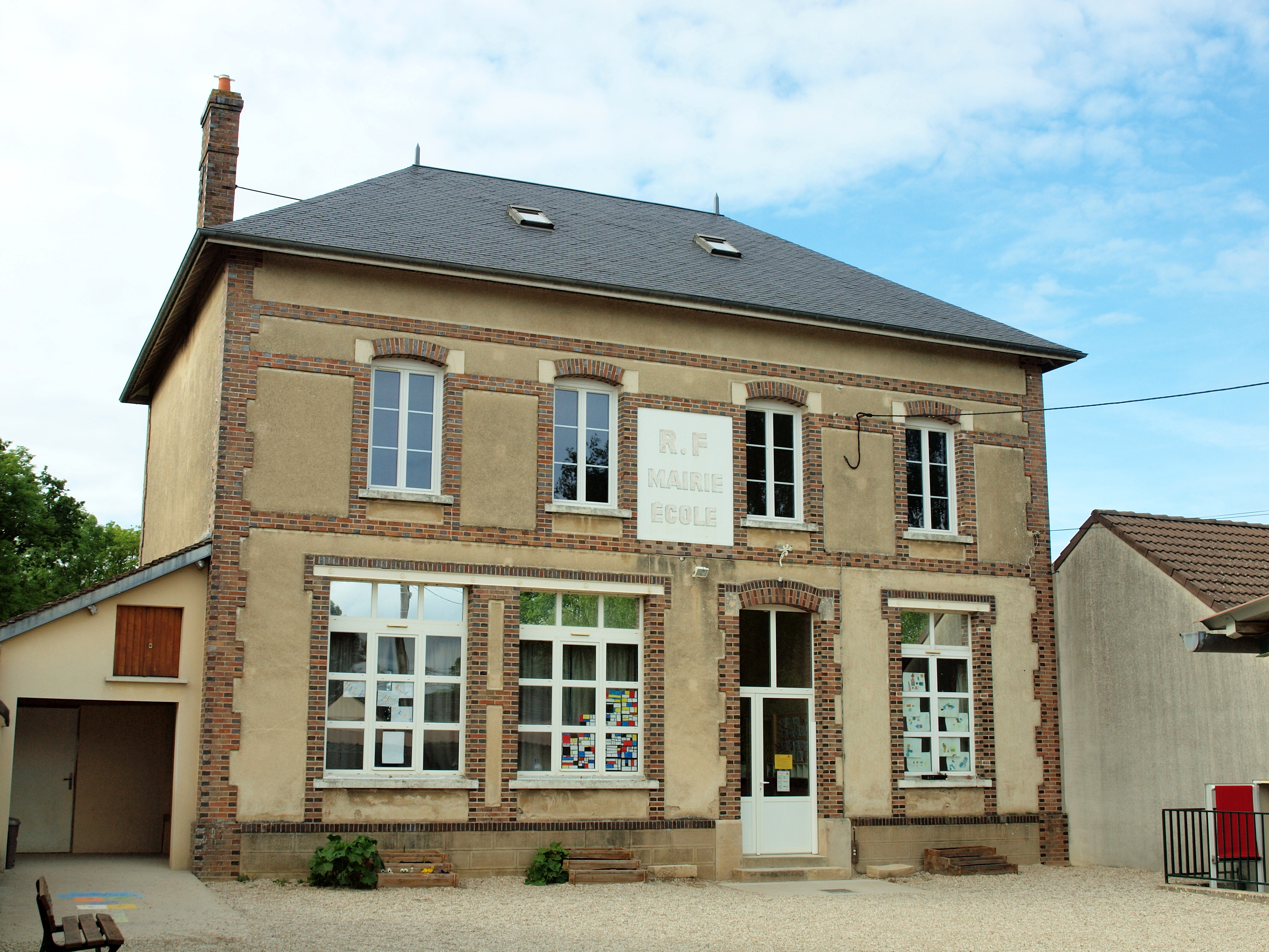 Cornant (Yonne, France)